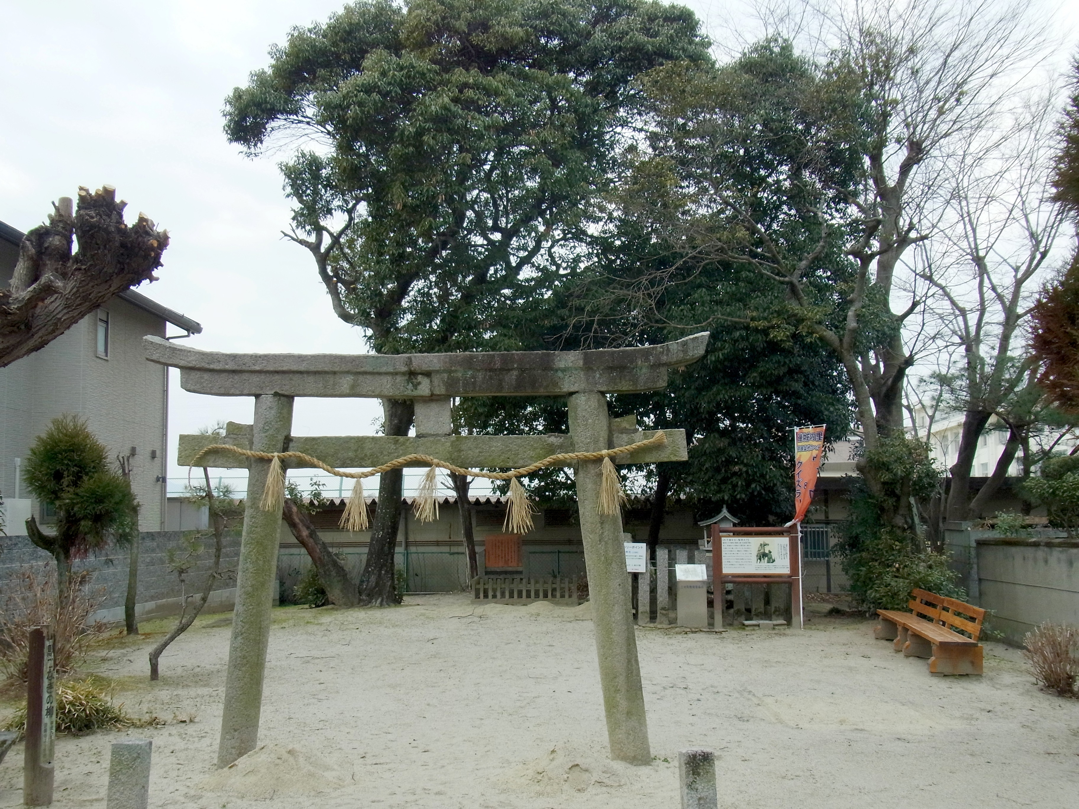 三宅町屏風 白山神社 2012.2.05